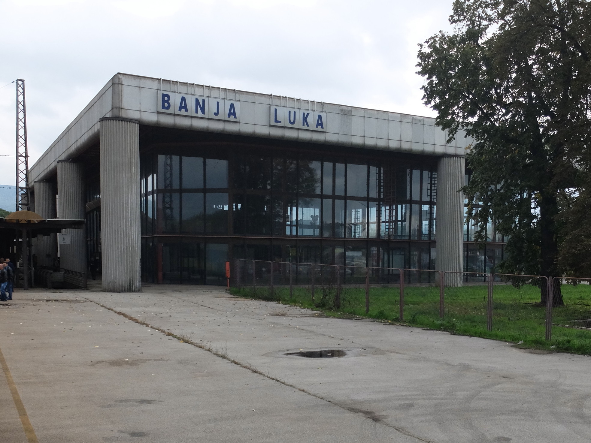 Hauptbahnhof Banja Luka